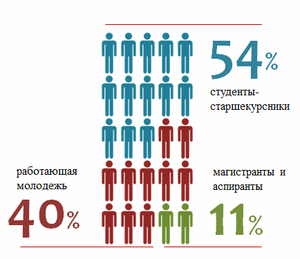 Состав первого набора программы "Умные сети"